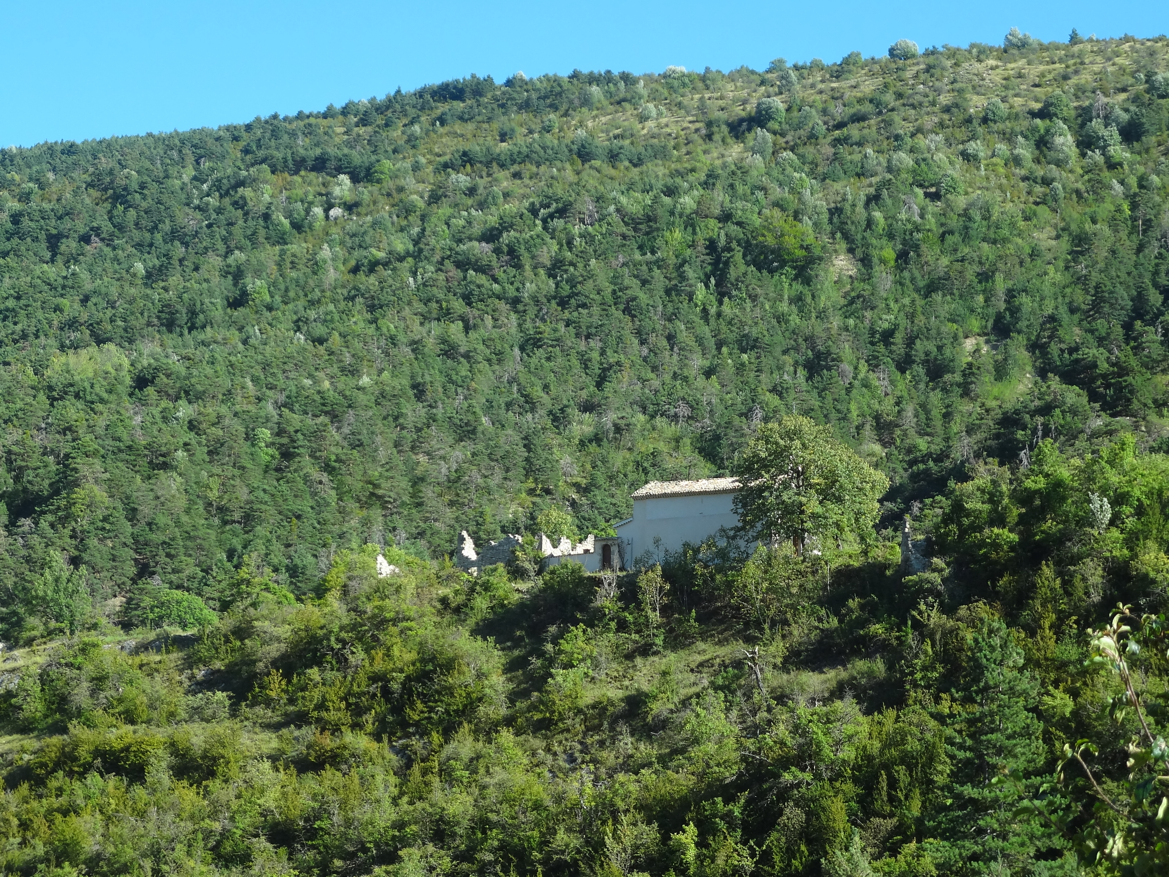 Ruines du village de Montblanc, et église paroissiale. Montblanc est une commune rattachée à Val-de-Chalvagne.